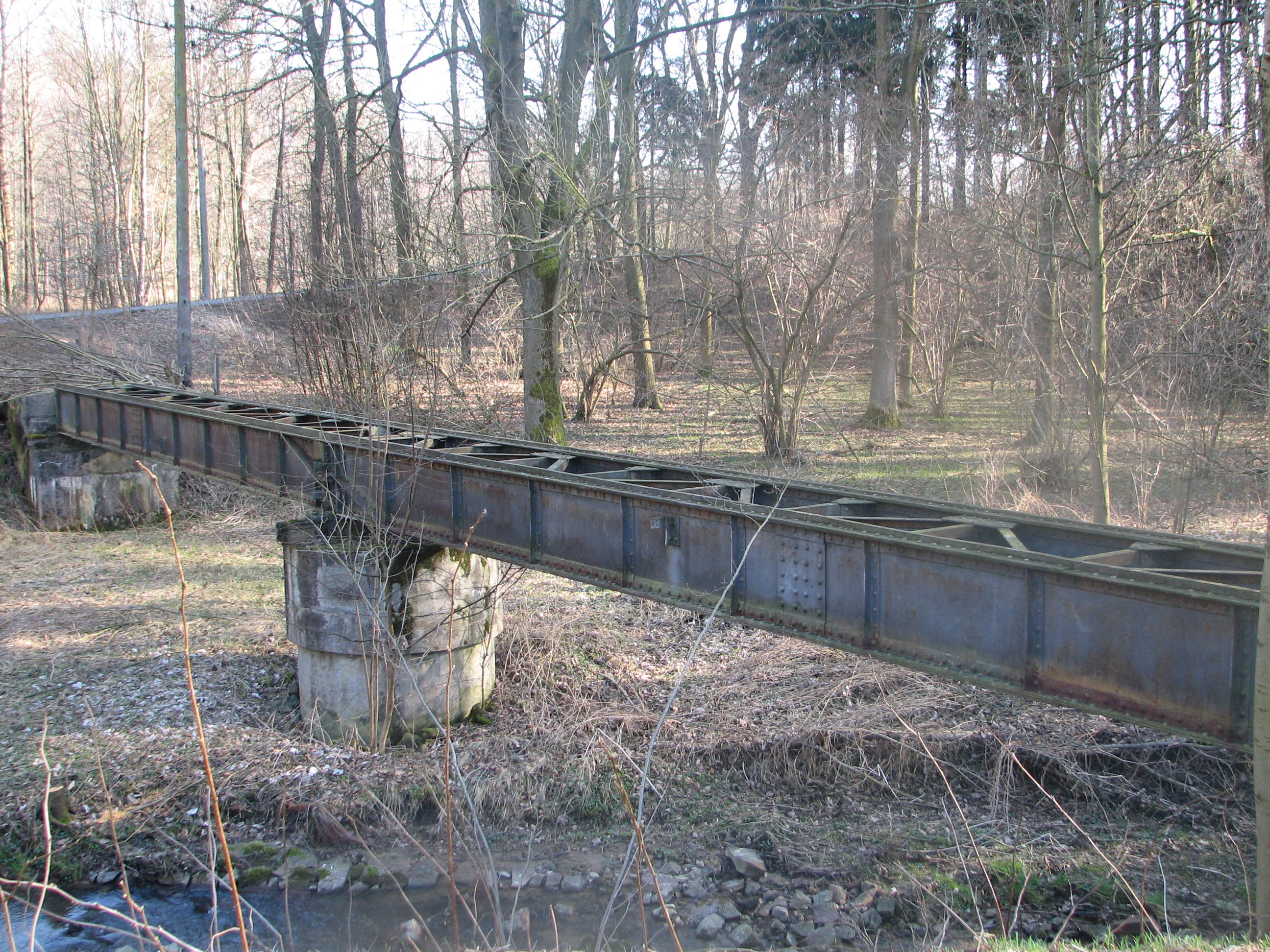 nicht mehr genutzte Brücke der Schmalspurbahn Wilsdruff-Gärtitz bei Polenz, Landkreis Meißen.